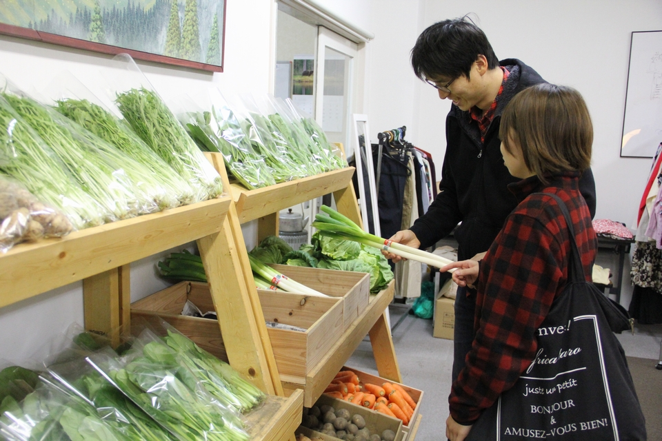 お金を介在しないで、自在に暮す経済の試みです。米や野菜、弁当・惣菜、日用品、嗜好品など、生活に必要なものが自由に得られるスペースです。